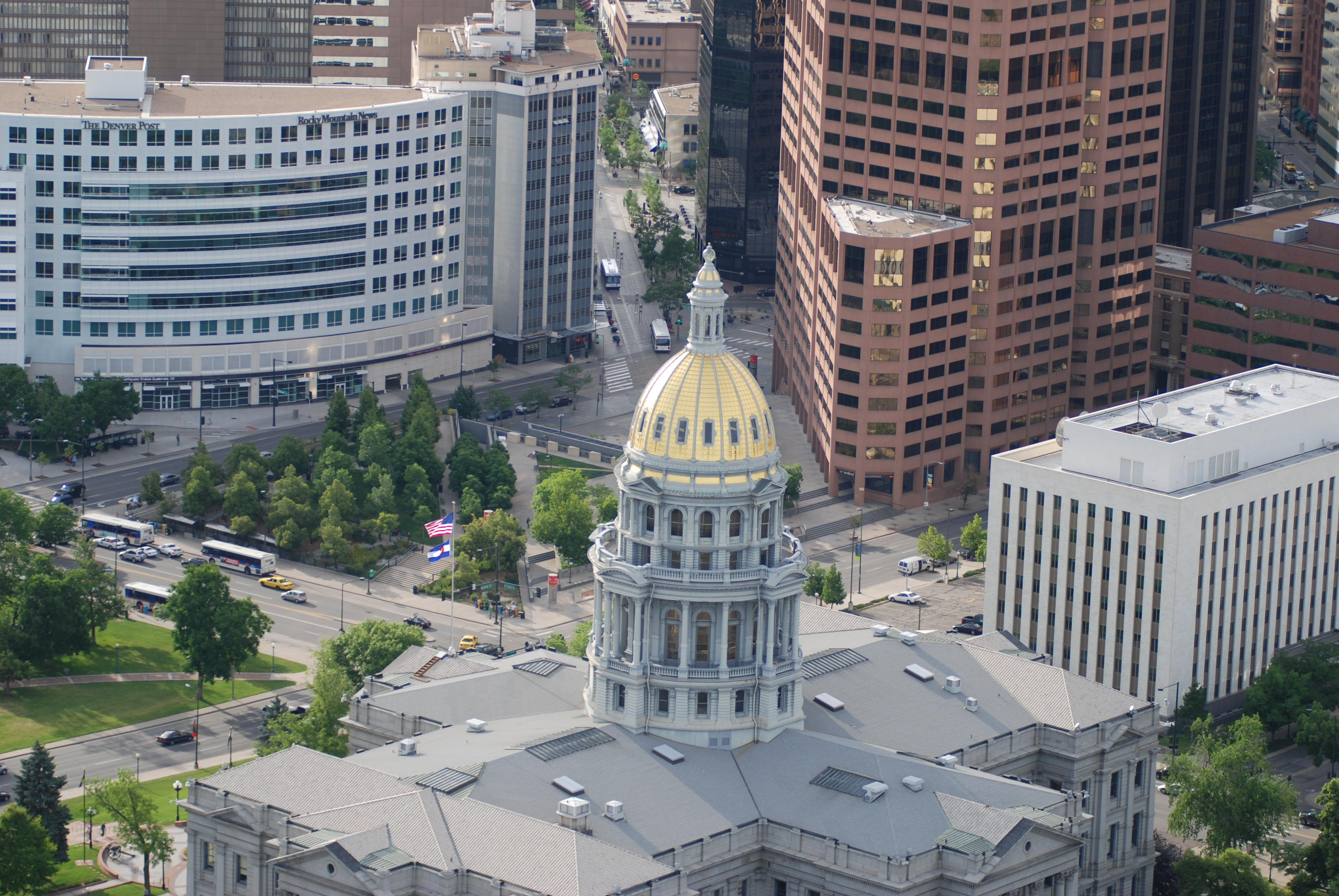 Colorado State Capitol, aerial view